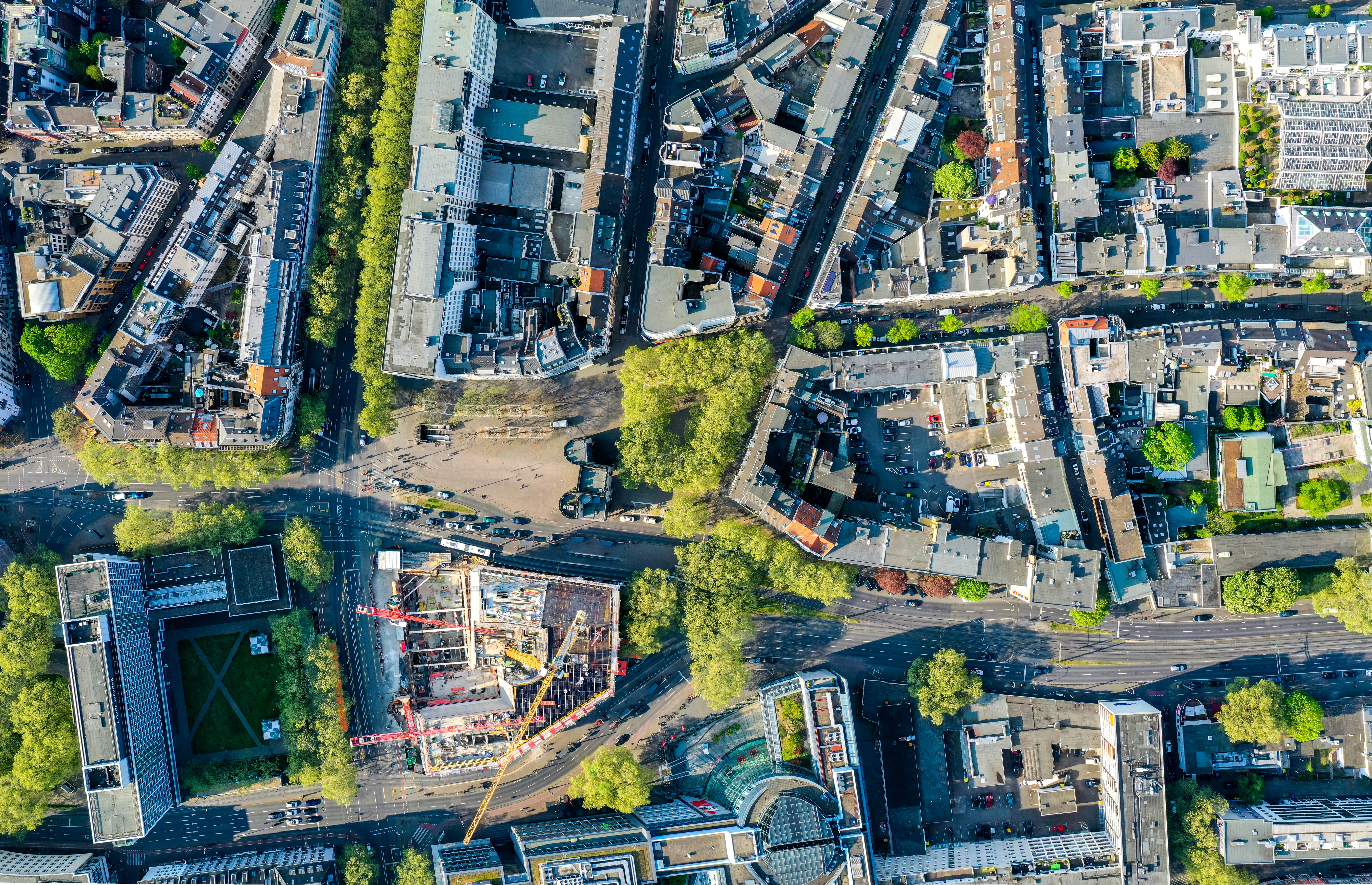 Rudolfplatz Köln im April 2020 – Drohnenaufnahme aus 250 m Höhe. Die Blickrichtung (oben) ist nach Norden. Es lagen für diesen ungewöhnlich hohen Dokumentationsflug Genehmigungen der Deutschen Flugsicherung, der Stadt Köln und der Bezirksregierung Düsseldorf vor. Bei Verwendung dieses Fotos ist es zwingend notwendig, Ross und Reiter zu nennen, also den exakten Link zu dieser Webseite und den Fotografen.